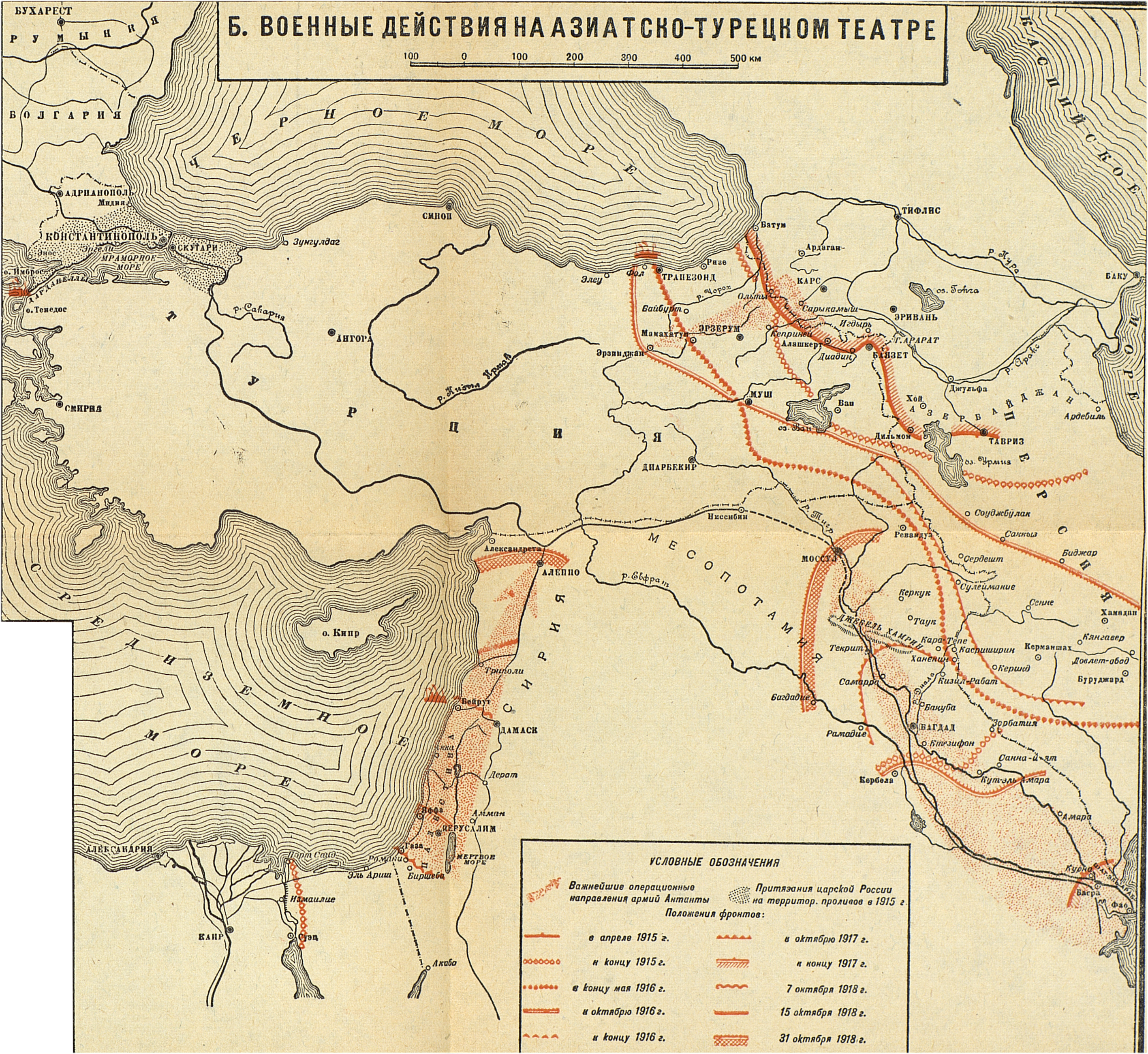 Лист №35. Азиатско-Турецкий театр. Кавказский фронт. Военные действия на азиатско-турецком театре